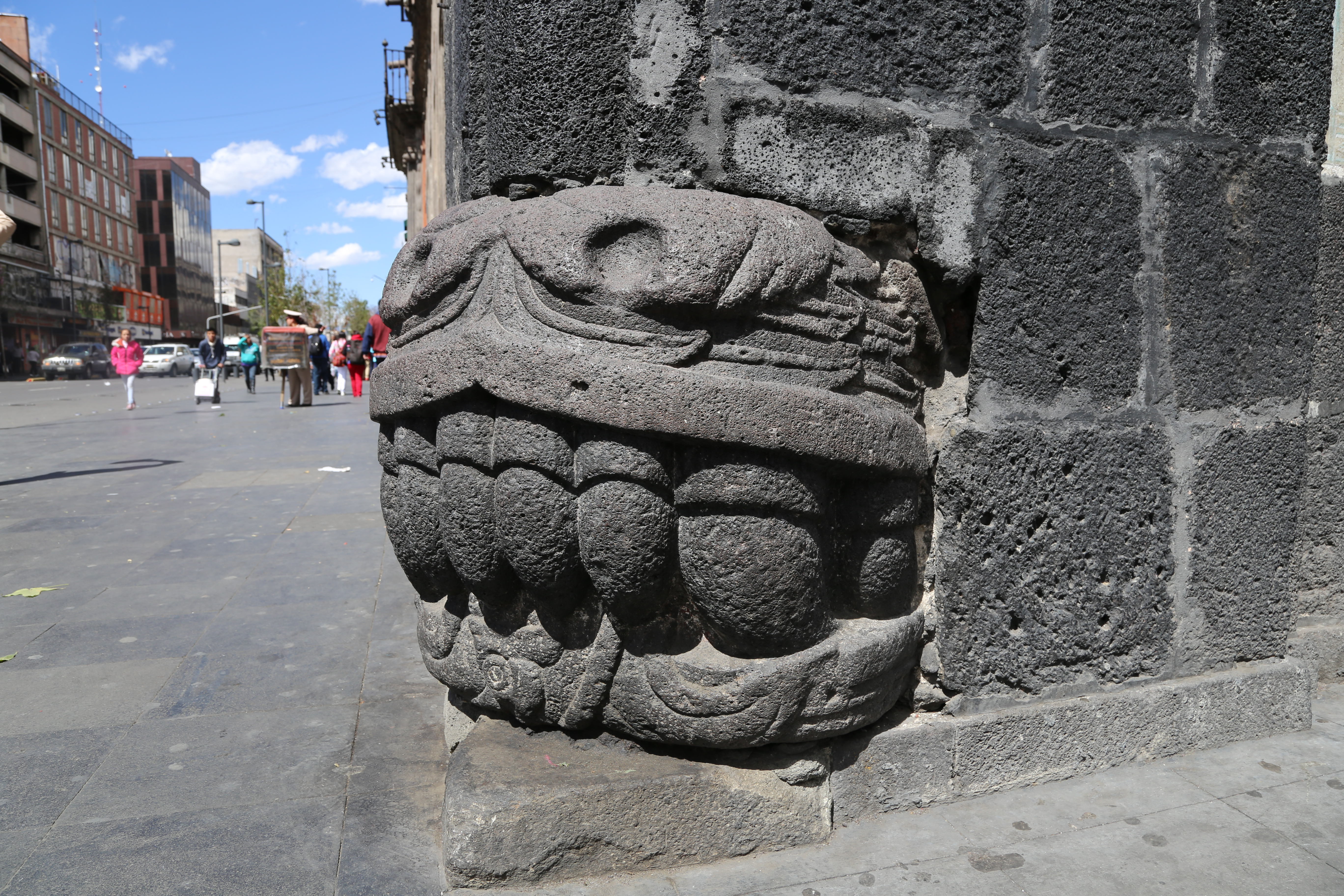 Vestigios de Tenochtitlan